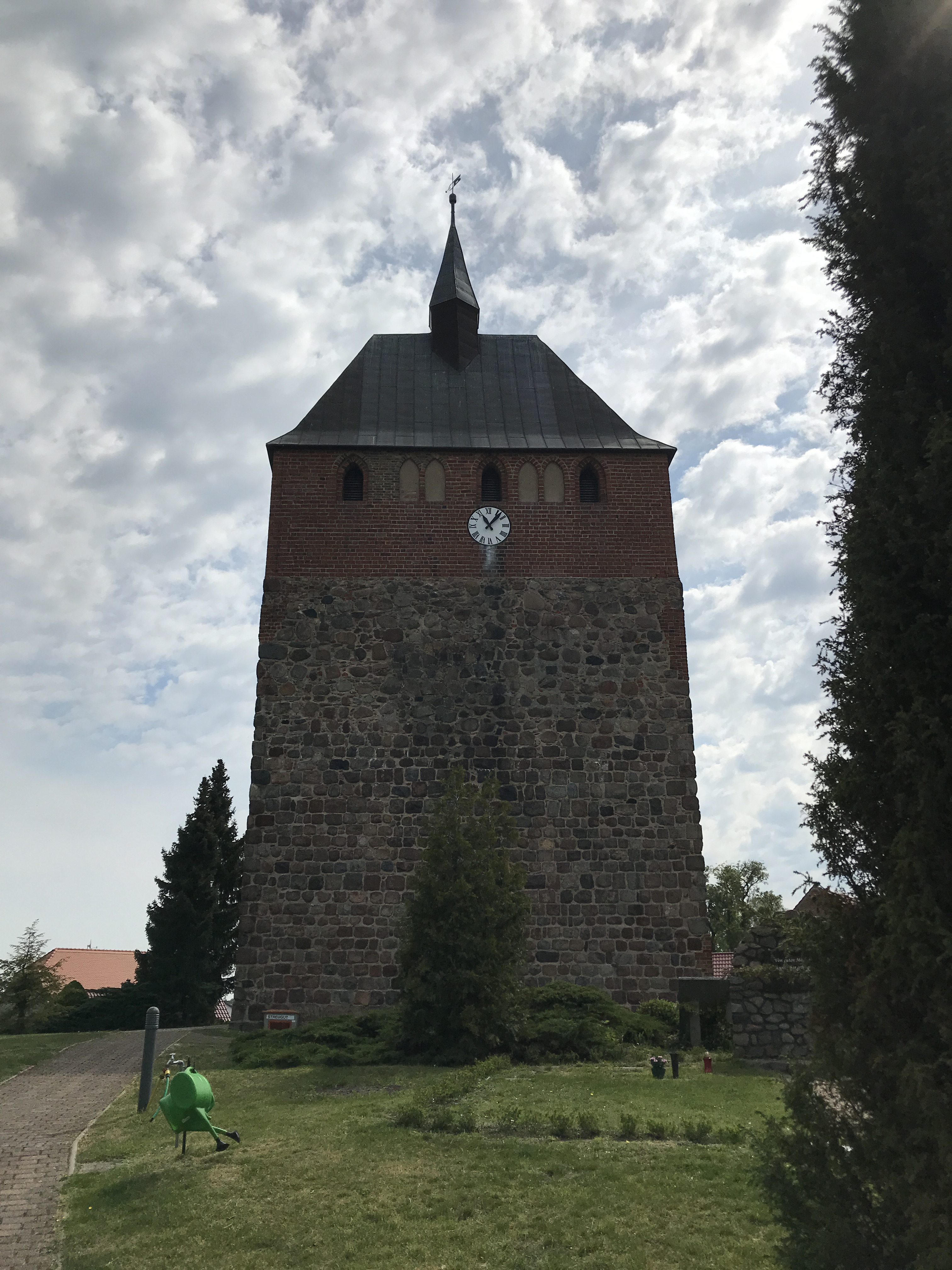 Die Dorfkirche Linthe ist eine Feldsteinkirche aus dem Anfang des 13. Jahrhunderts in Linthe, einer Gemeinde im Landkreis Potsdam-Mittelmark in Brandenburg. Im Innern steht unter anderem ein Altarretabel aus dem Anfang des 18. Jahrhunderts.